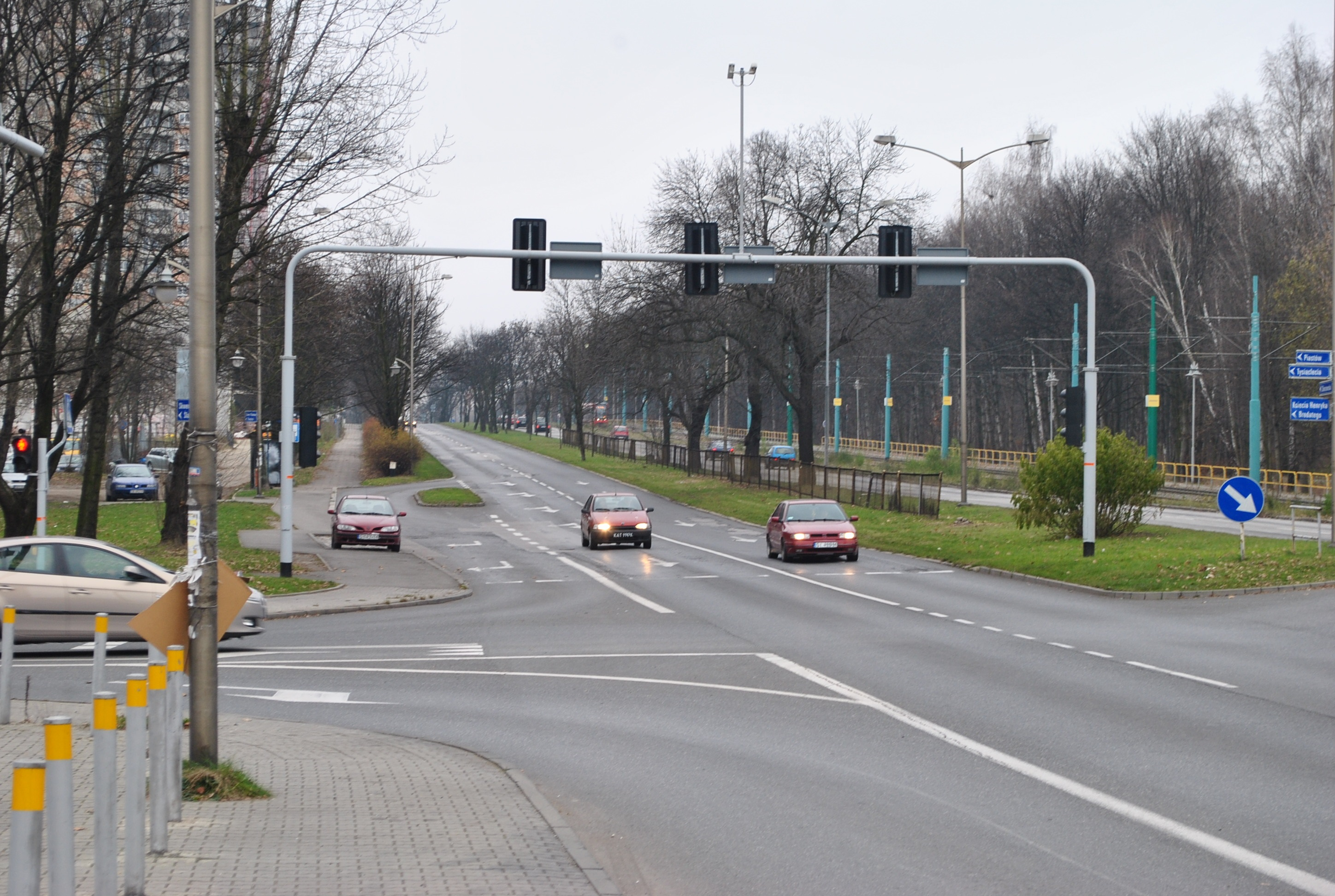 Katowice, Osiedle Tysiąclecia. Ulica Chorzowska (widok w kierunku Chorzowa)